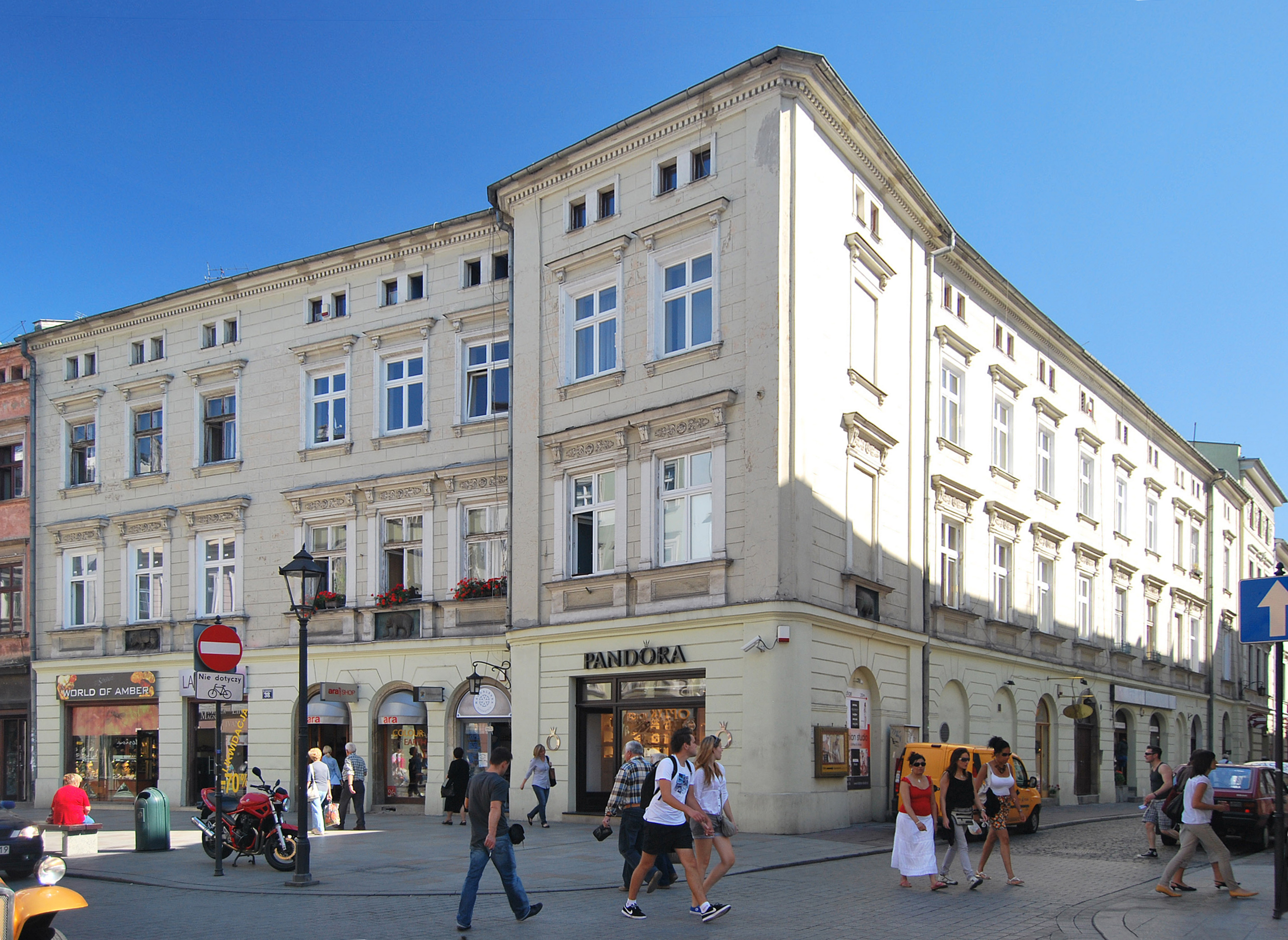 Kamienica przy ulicy Poselskiej 18 i Grodzkiej 38 w Krakowie